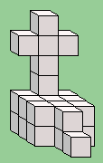 Egen teckning